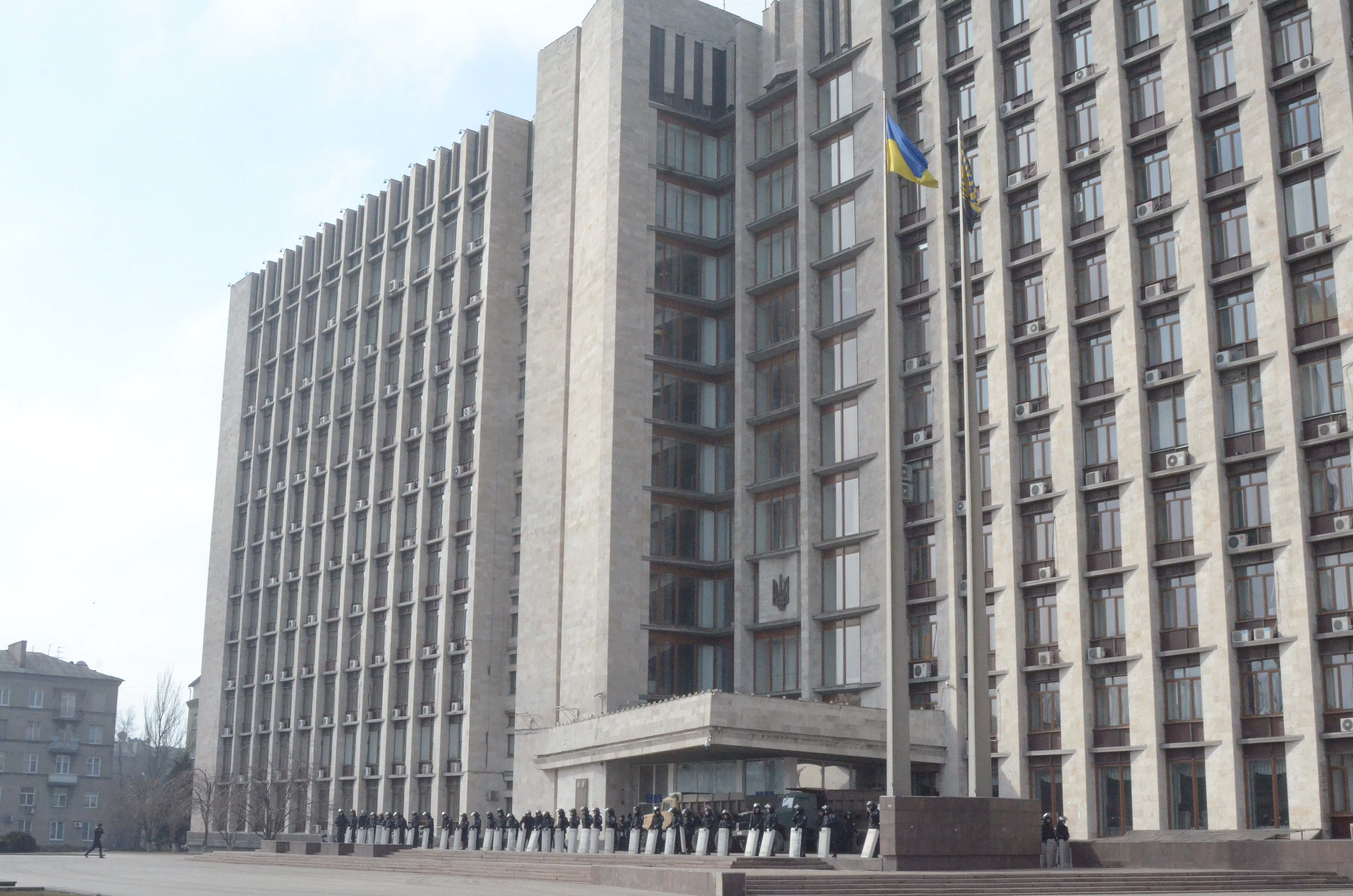 Донецкая облгосадминистрация